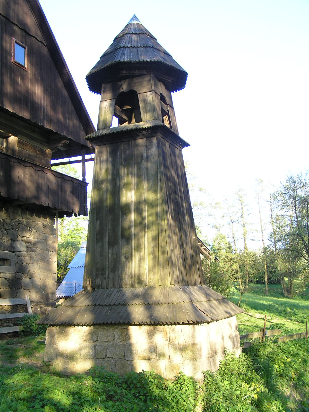 Zvonice ve Škodějově (před rekonstrukcí)